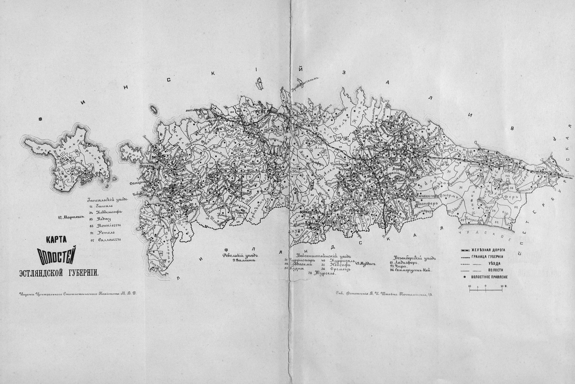 Карта волостей Эстляндской губернии